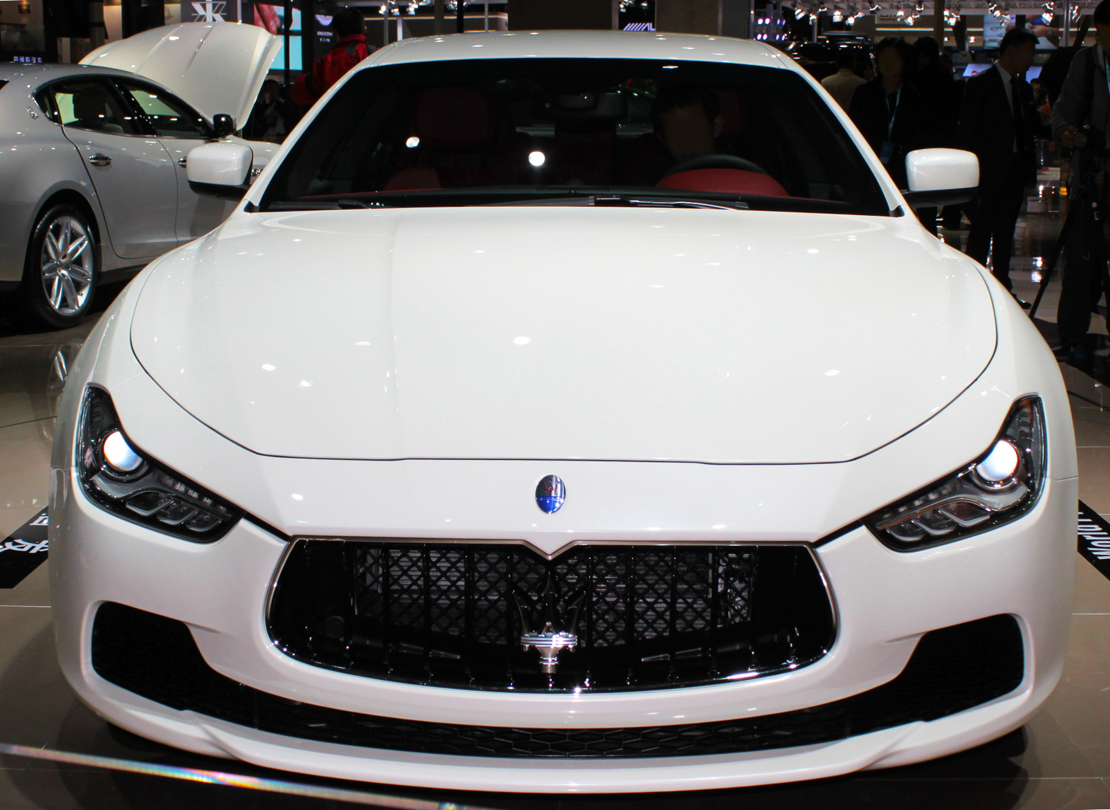 Una Maserati Ghibli III (2013) bianca allo Shanghai auto show 2013. Trattasi di una supercar sedan a 4 porte, sorella minore della quattroporte 2013.